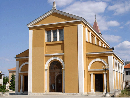 Arbanasi